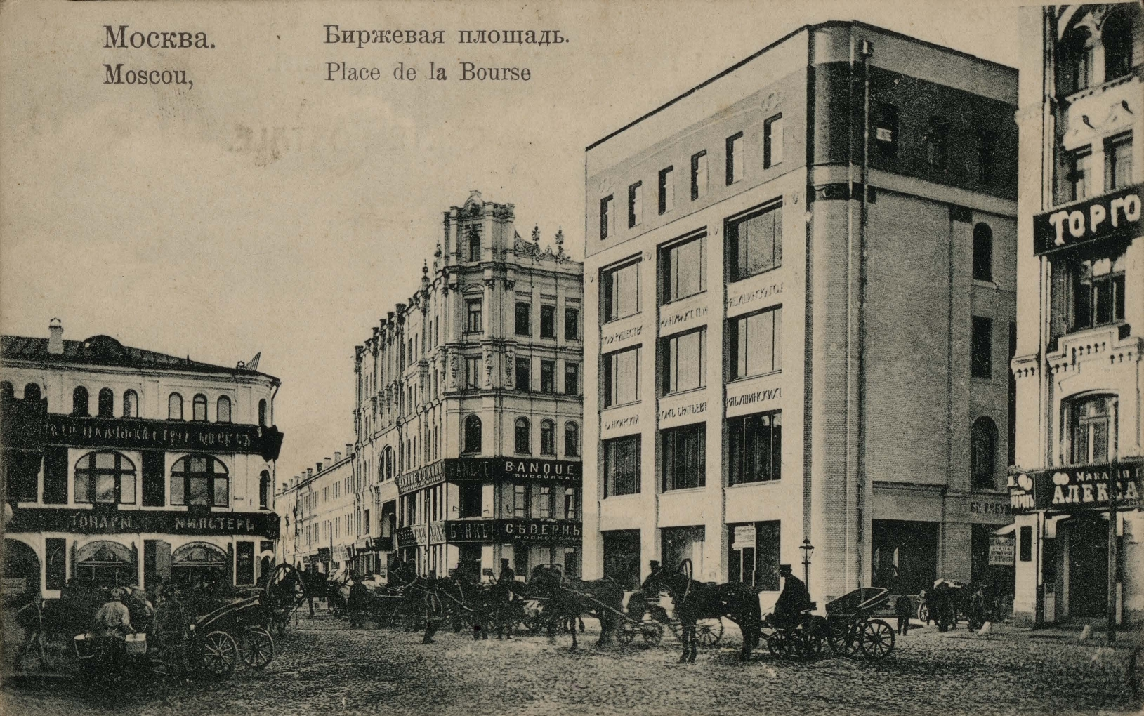 Биржевая площадь. Москва. Москва. [Открытка]. - Москва : Торг. Дом. Северное Художествен. Издательство, Июль 1912. - 1 л. : фототип.; 8,3x13,5 см.